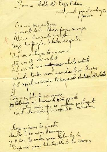 Manuscrito de Poema doble del lago Edem, de García Lorca.